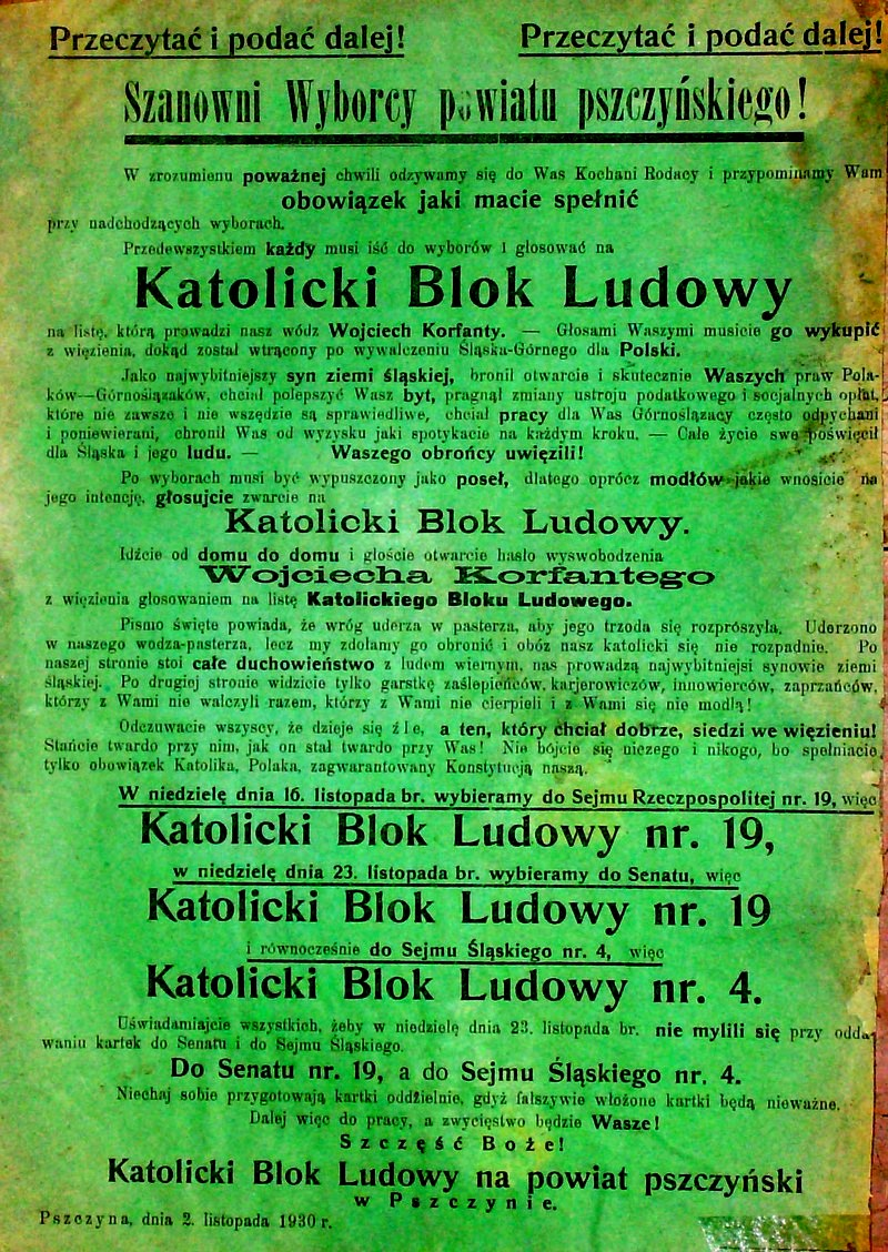 Ulotka wzywająca do głosowania na Katolicki Blok Ludowy i uwolnienia Wojciecha Korfantego z więzienia w Brześciu